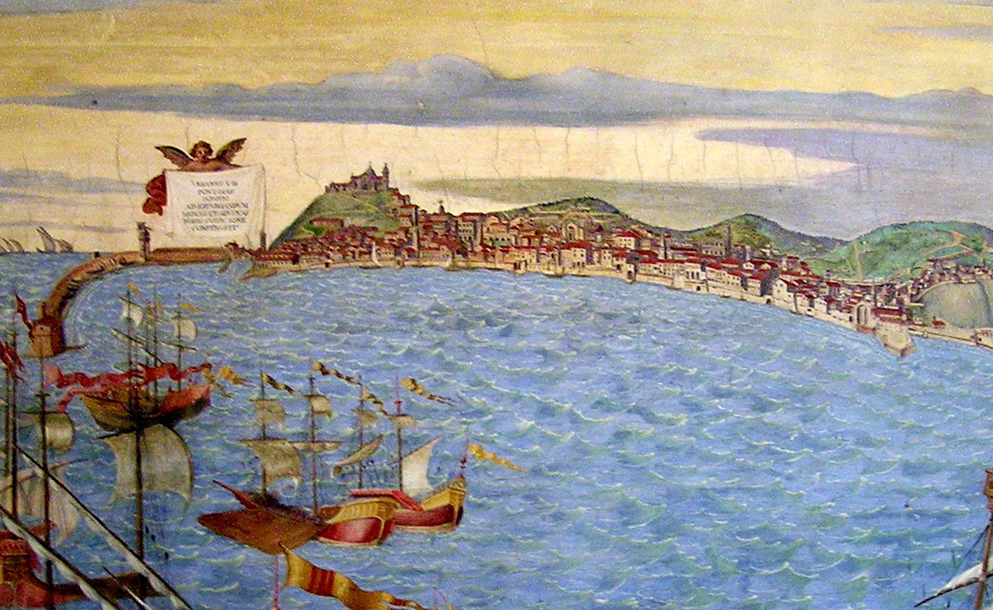 Particolare della veduta di Ancona, dipinto conservato nella Galleria delle Carte Geografiche ai Musei Vaticani, Roma